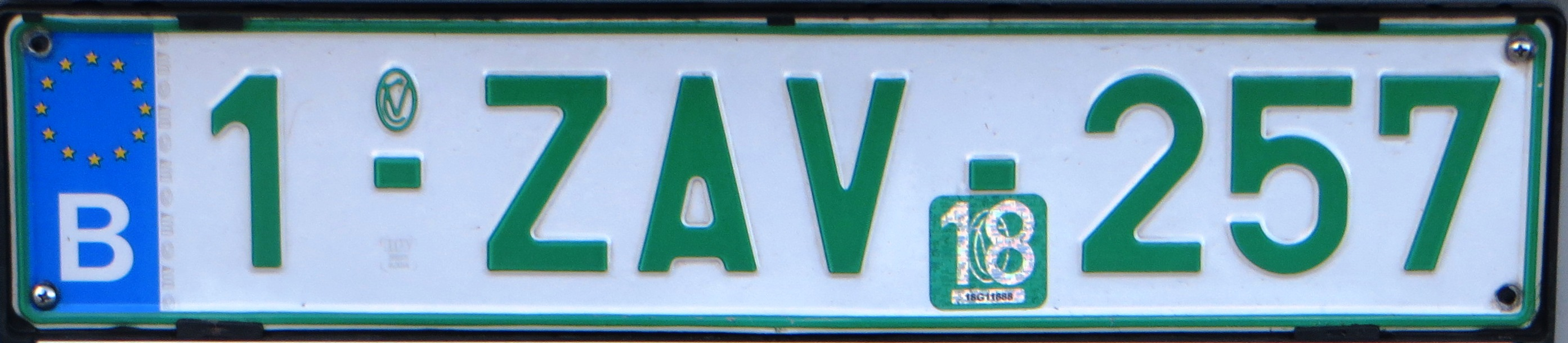 dealer plaat België